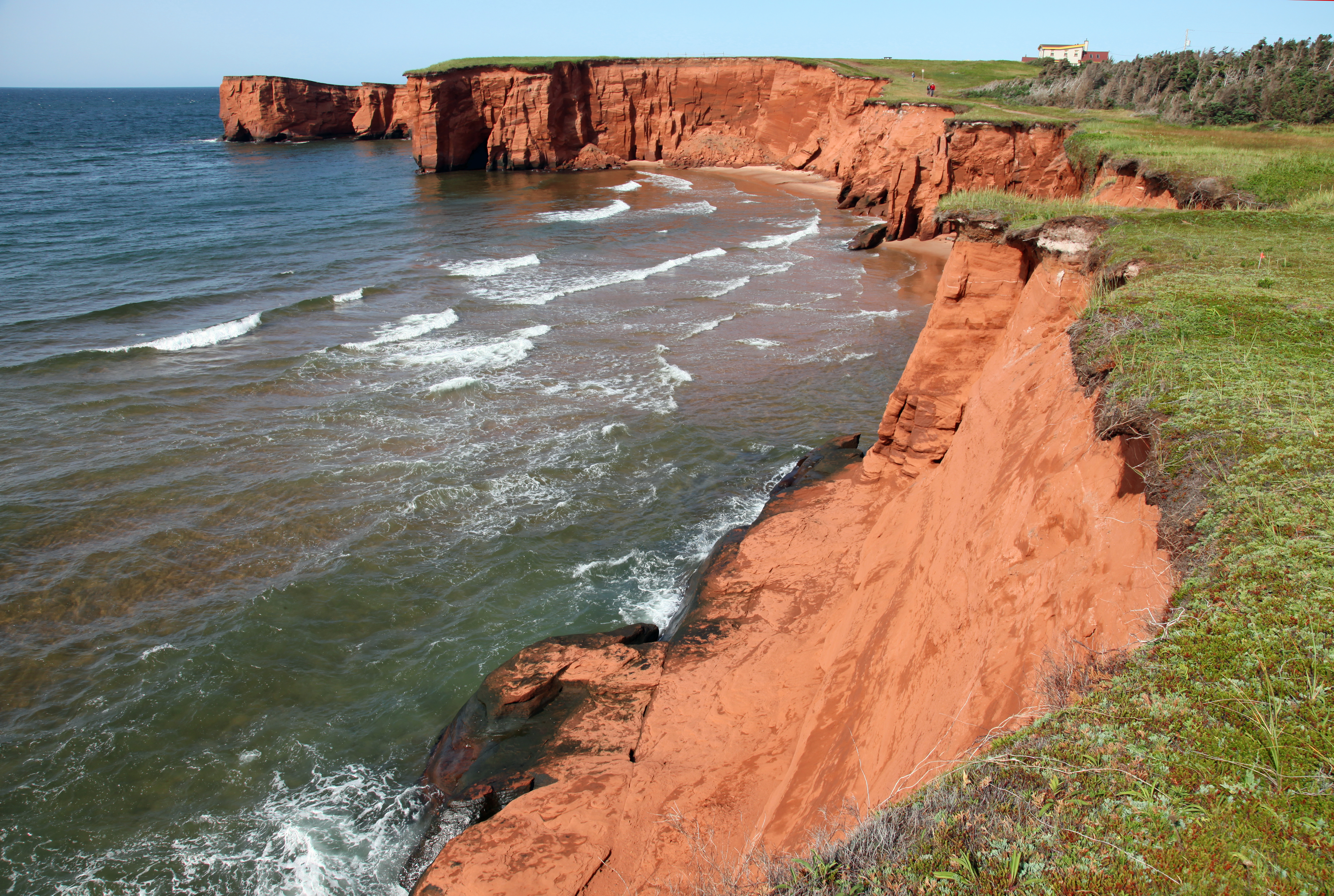 Bodenerosion an der bis zu 30 Meter hohen Steilküste der Îles de la Madeleine, die an mehreren Uferabschnitten vorkommt und gänzlich aus Quartzsedimentgestein besteht, das mit rotem Eisenoxyd gemischt ist. Dieser Sandstein ist sehr weich und wird von der Wind- und Wellentätigkeit des Atlantiks jedes Jahr im Durchschnitt um 80 Zentimetern abgetragen und fortgespült. Dafür hebt sich im Verlauf eines Jahrhunderts die gesamte 202 km² grosse Inselgruppe um 35 Zentimeter aus dem Meer empor. Es gibt Uferbereiche, wo die Strasse wegen Absturzgefahr bereits gesperrt werden musste. Seit 2004 verbietet die Regionalverwaltung der Îles de la Madeleine jede Bautätigkeit auf weniger als 30 Metern des Uferbereiches!